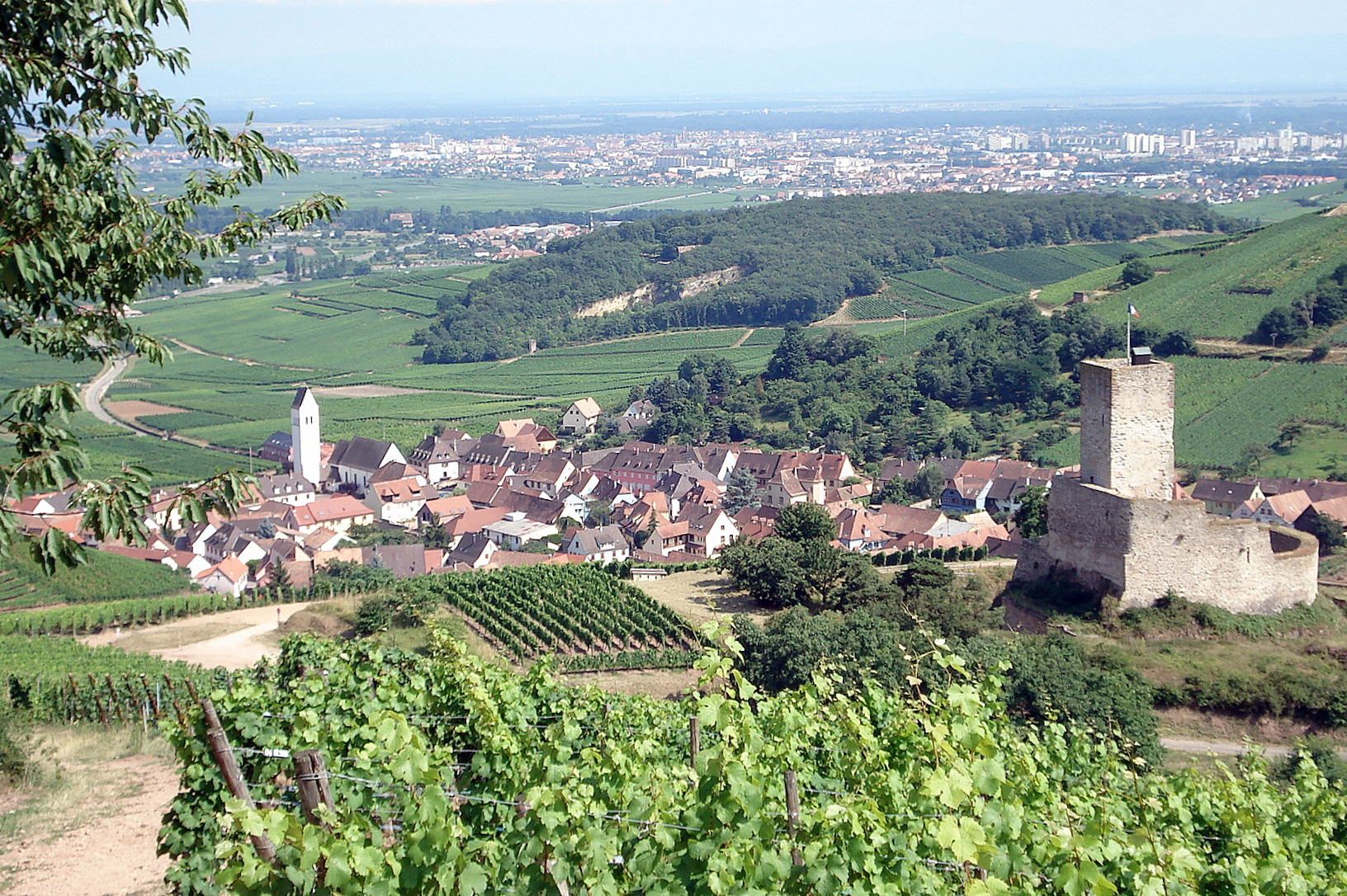 Le village de Katzenthal, dép. du Haut-Rhin, Alsace, France. À l'avant-plan à droite: château ruiné du Wineck, entouré de vignobles. En contrebas, le village. À l'arrière-plan: la plaine d'Alsace, où s'étire l'agglomération colmarienne. Dans le lointain, la silhouette, à peine perceptible, des Alpes bernoises.